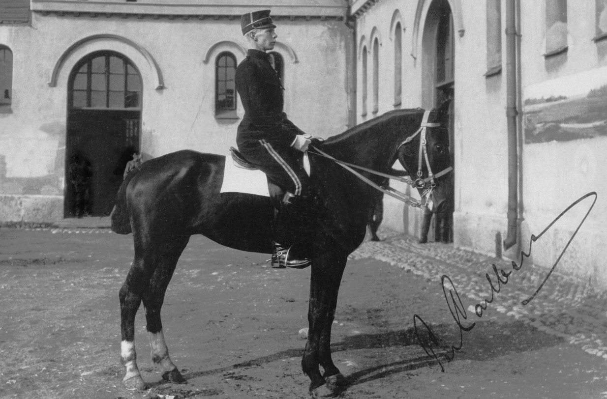 Hästen Frey och underlöjtnant Per Carlberg som vann den första omskrivna och långa distansritten från Jönköping till Stockholm 1895.